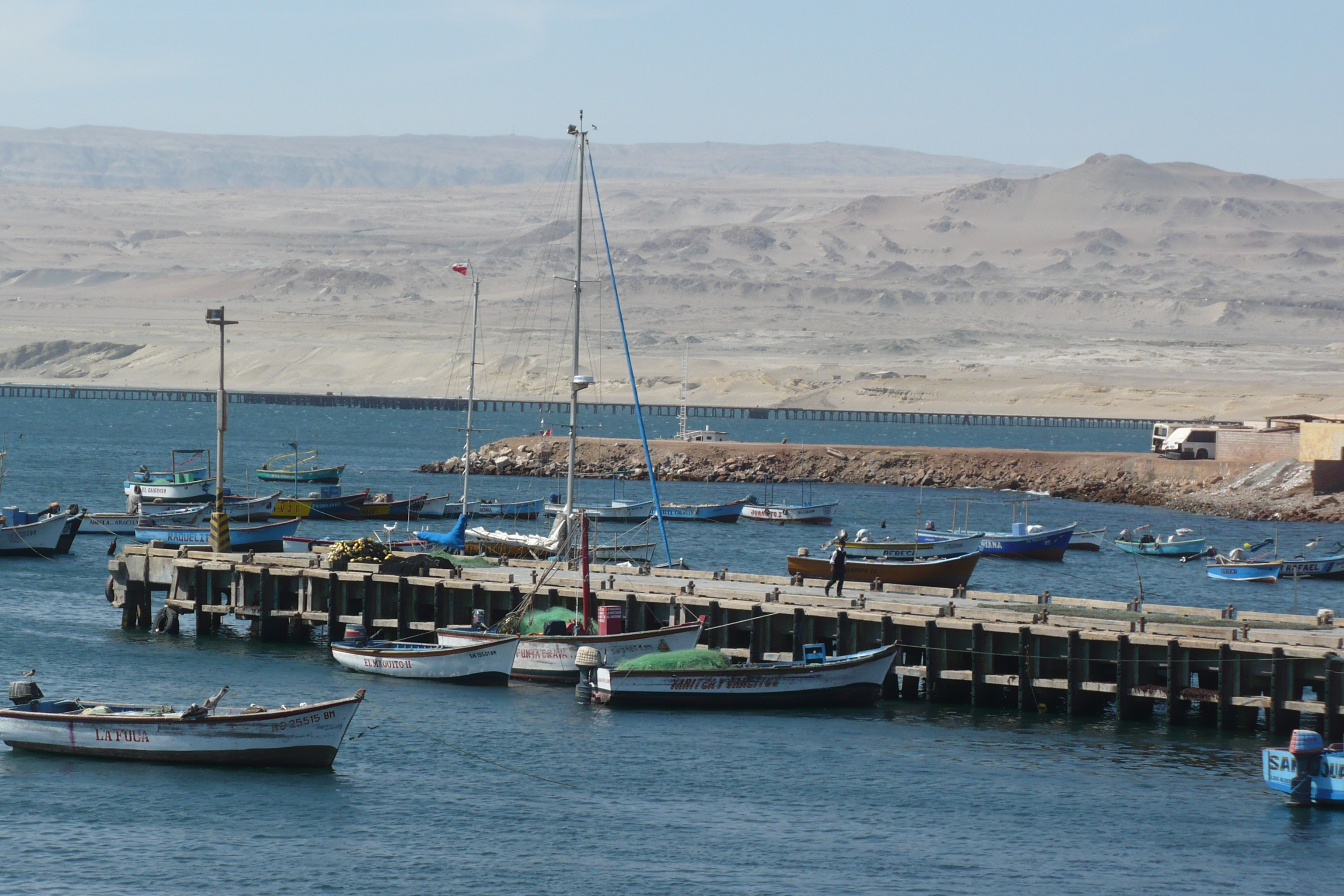 Harbour in San Juan de Marcona